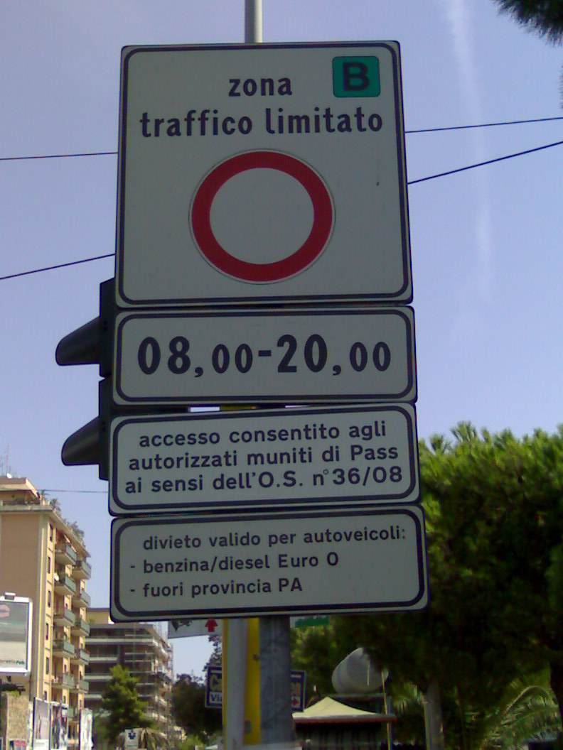 Cartello di restrizioni per l'ingresso alla Zona a traffico limitato B di Palermo